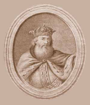 Svjatoslav Vsevolodovich